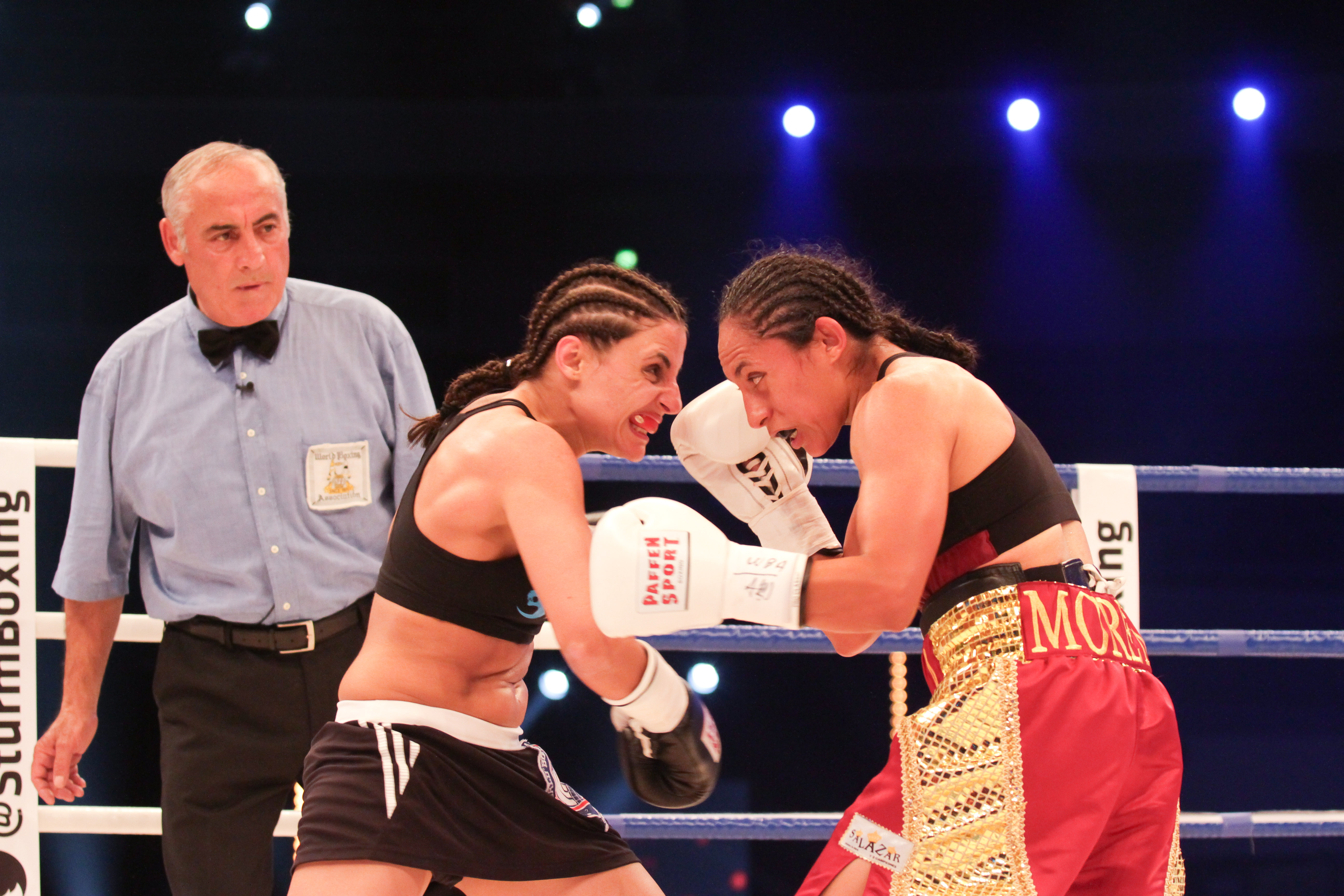 Dortmund, Westfahlenhalle Dortmund, 06.07.2013, „Back to the Top! Susi Kentikian (schwarz) vs. Carina Moreno (rot)